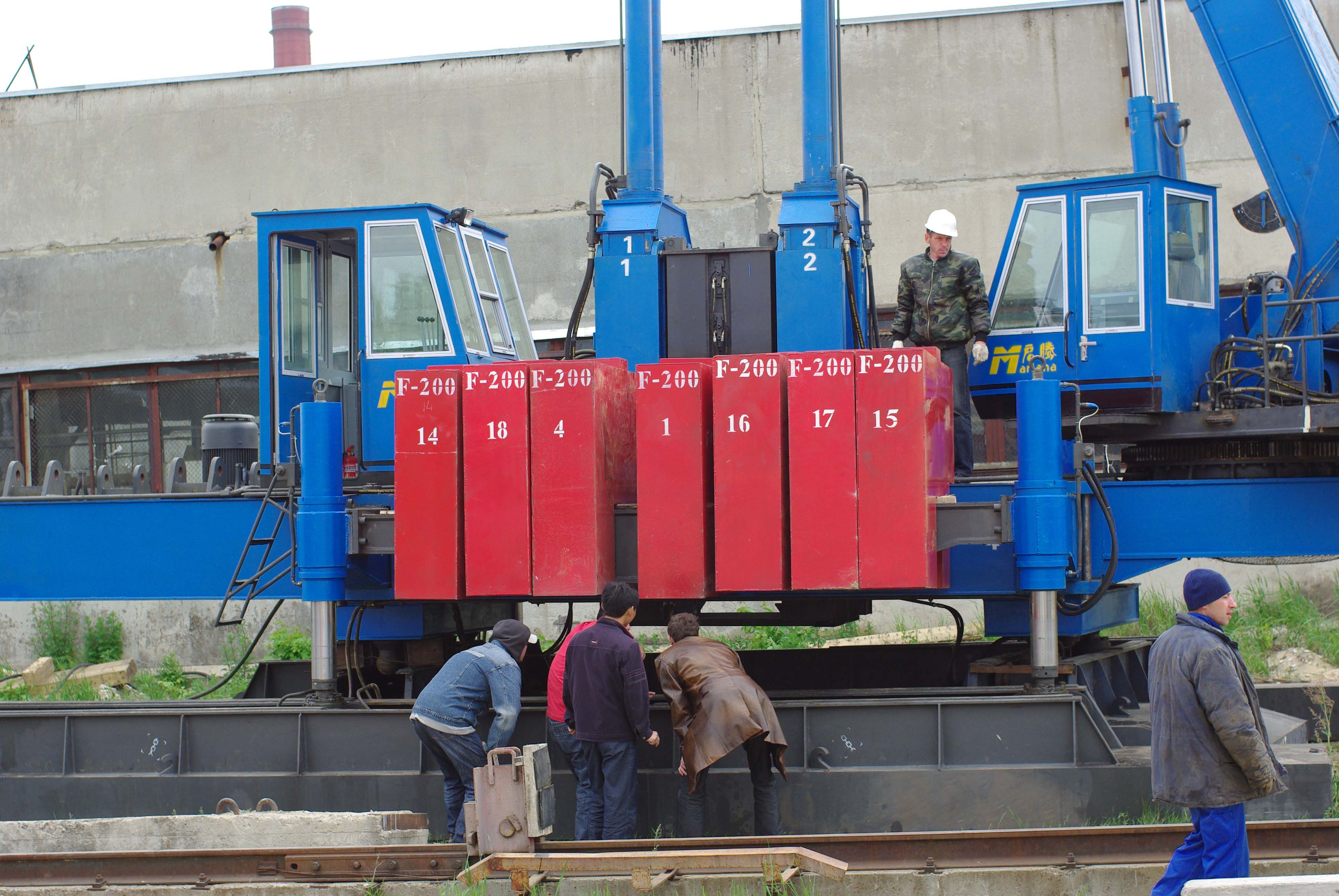 Противовесы для сваевдавливающей установки